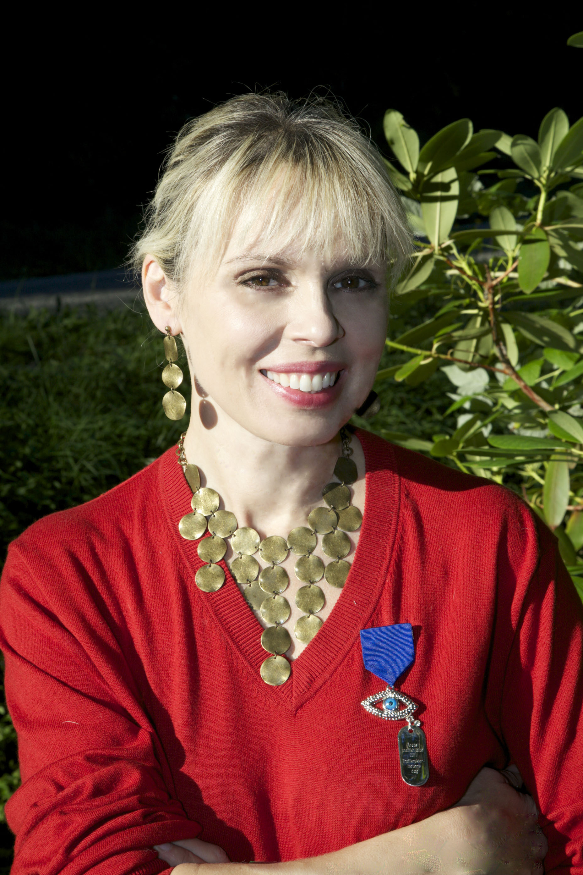 Den svenska artisten och smyckesdesignern Michaela de la Cour.